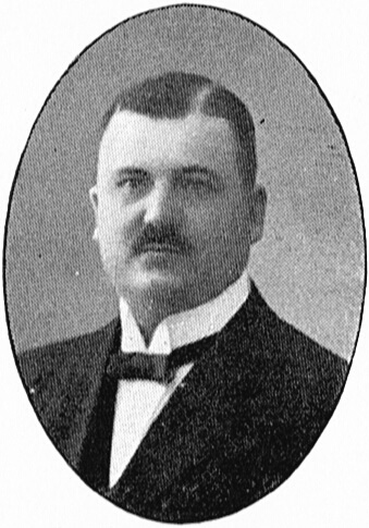 Arkitekten Mauritz Lundstedt